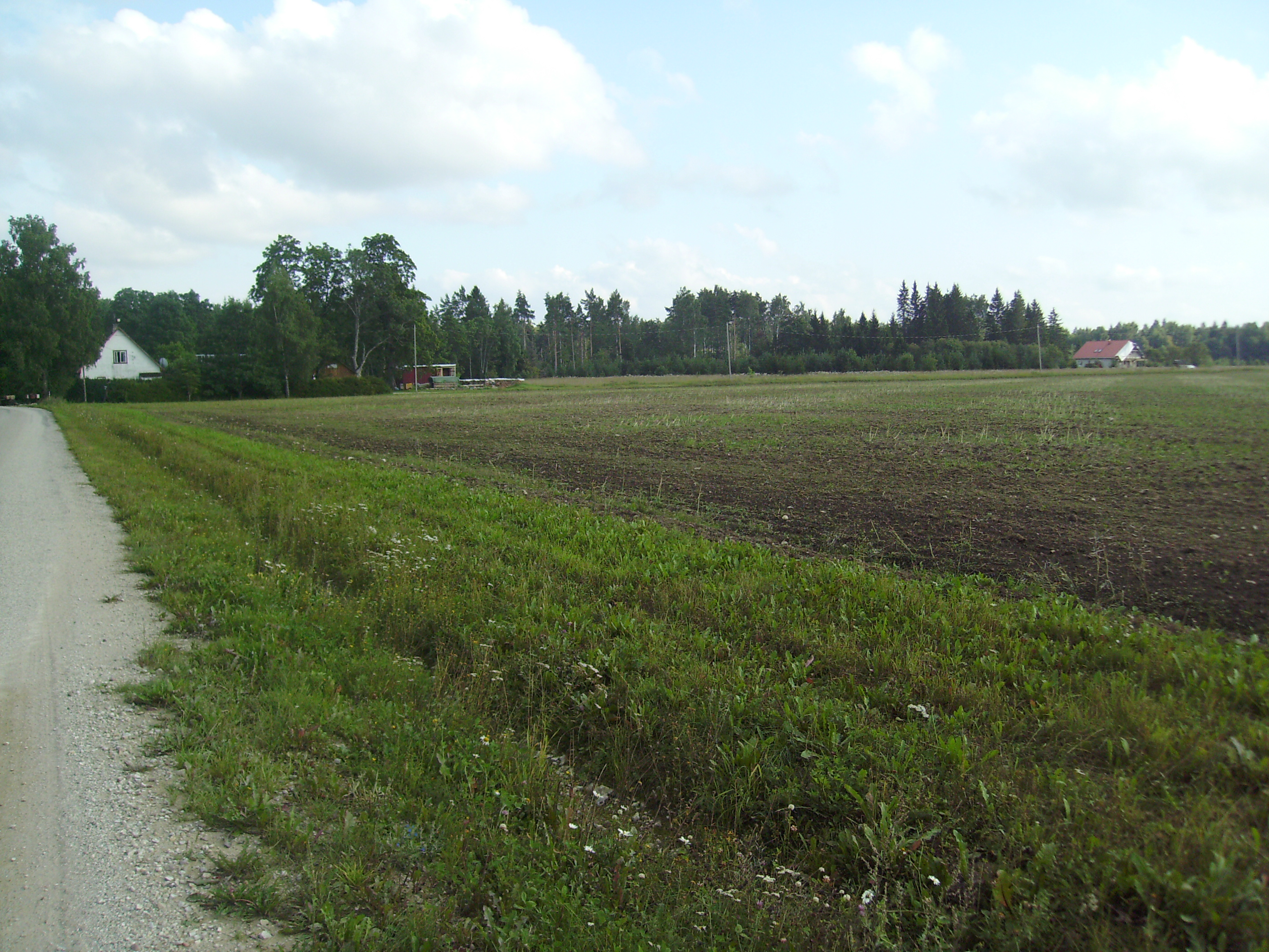 Rootsi küla Kohila vallas.